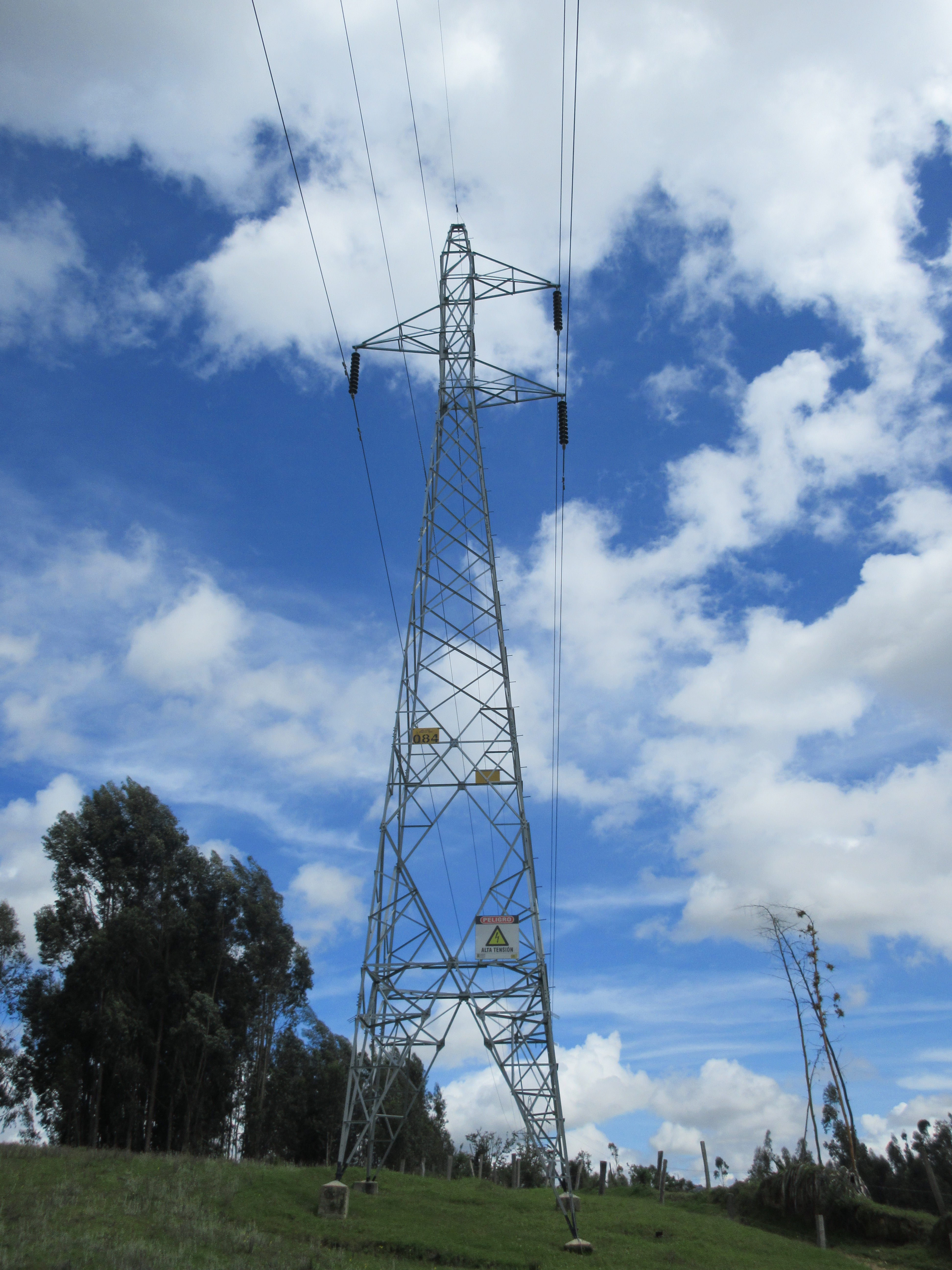 Torre de 115 kV de la segunda etapa Paipa - Tunja